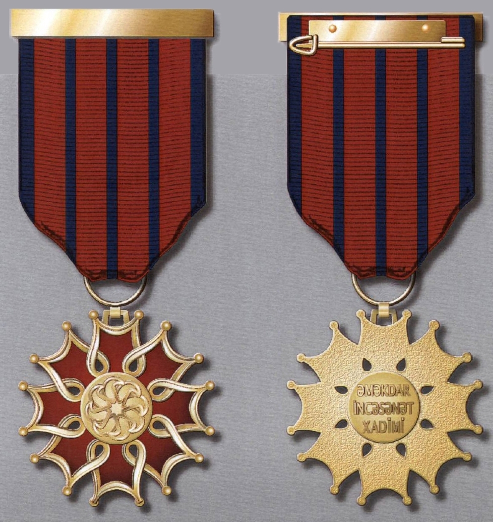 “Əməkdar incəsənət xadimi” fəxri adının döş nişanı